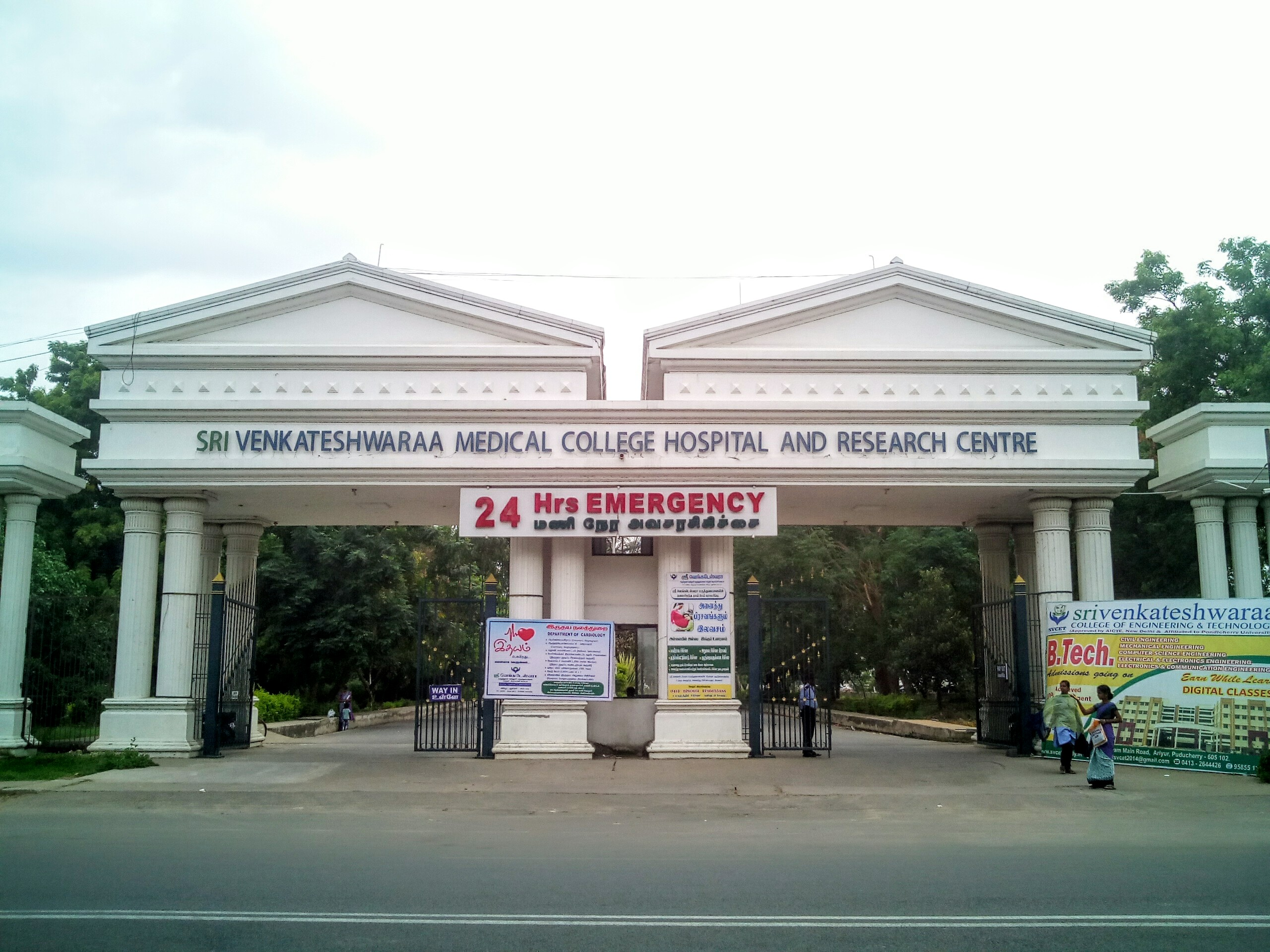 சிறீ வெங்கடேசுவரா மருத்துவக் கல்லூரி மற்றும் ஆராய்ச்சி நிறுவனத்தின் நுழைவாயில் ...